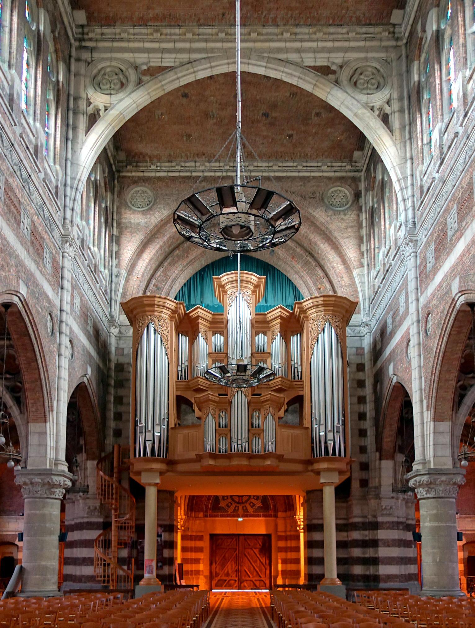 L'orgue de l'église Saint-Vaast de Béthune.